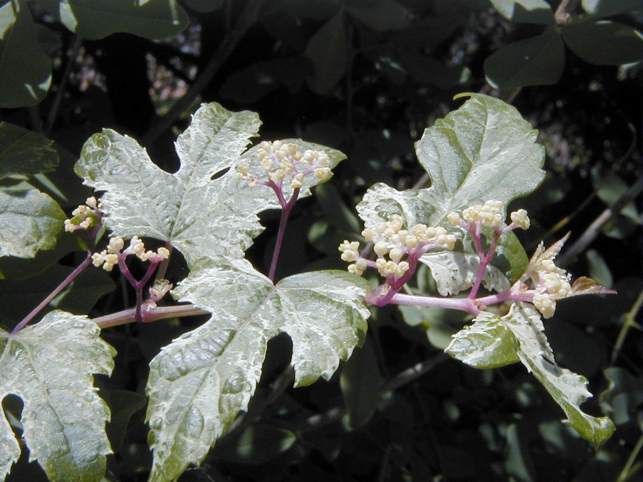 Ampelopsis brevipedunculata 'Elegans'. Real Jardín Botánico, Madrid.